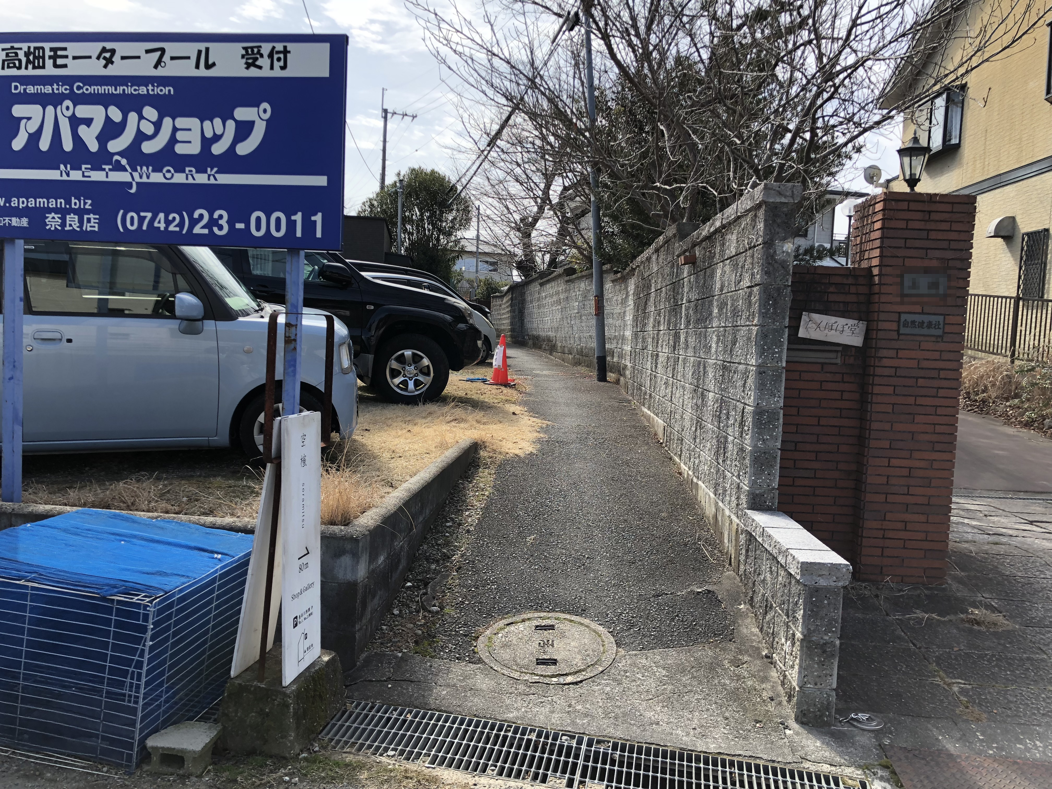 現在の景清辻子：北側から